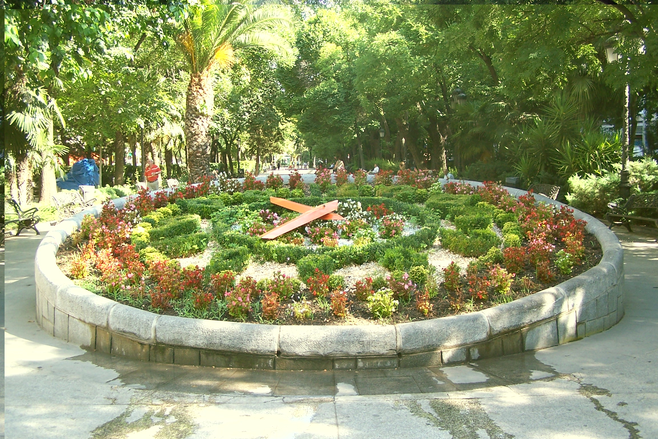 RELOJ DE FLORES EN EL PASEO SAN GREGORIO DE PUERTOLLANO